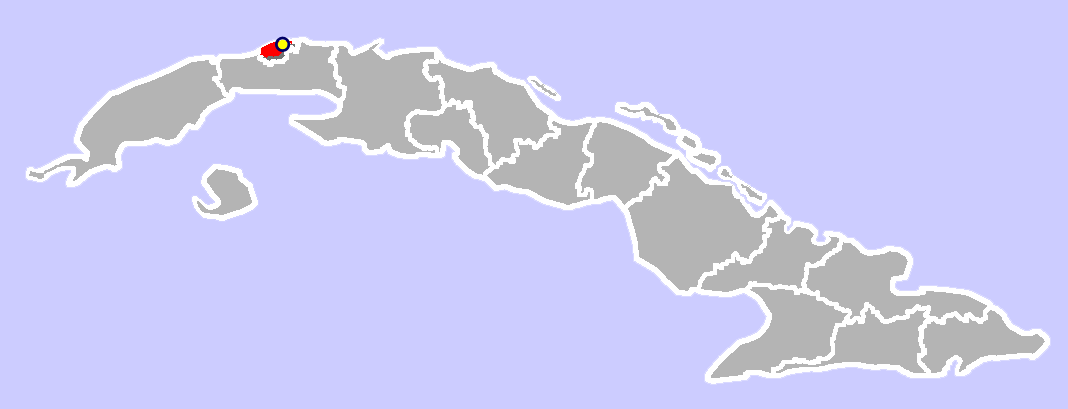 Location of Habana del Este, Cuba